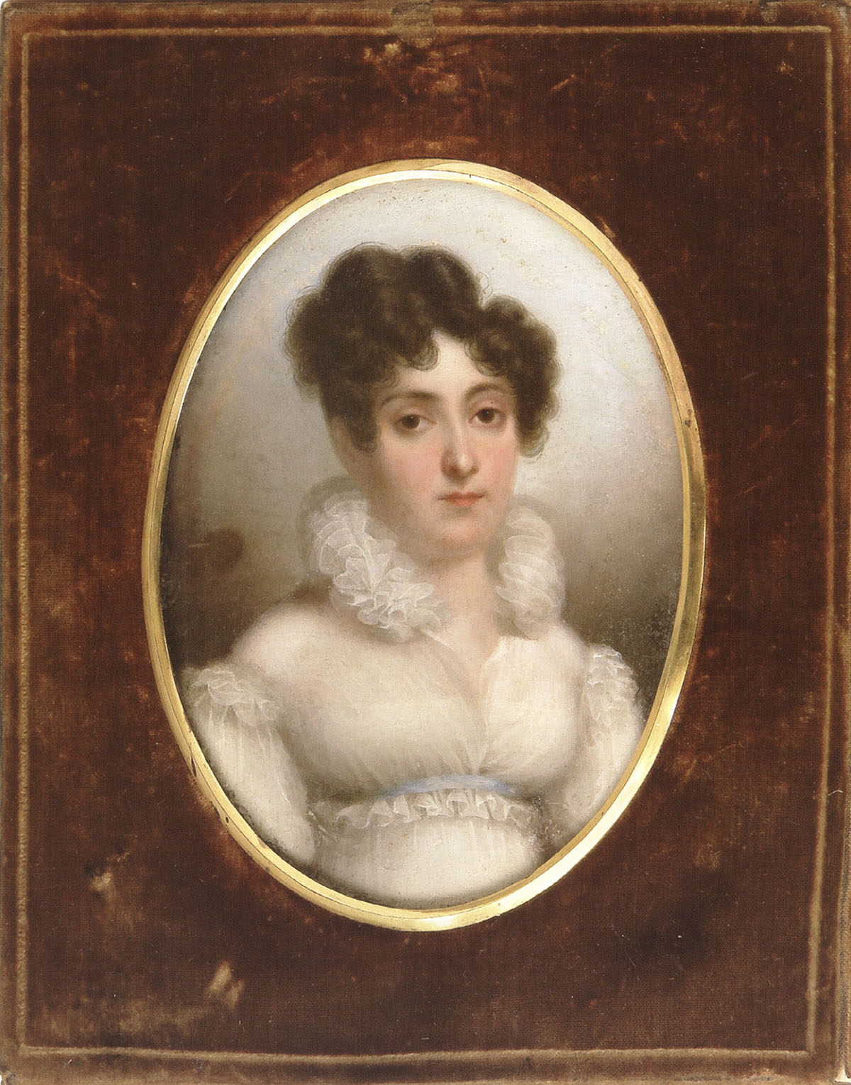 Княгиня Екатерина Алексеевна Оболенская, ур. Мусина-Пушкина (1786-1870).